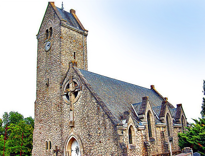 vue du sud-ouest